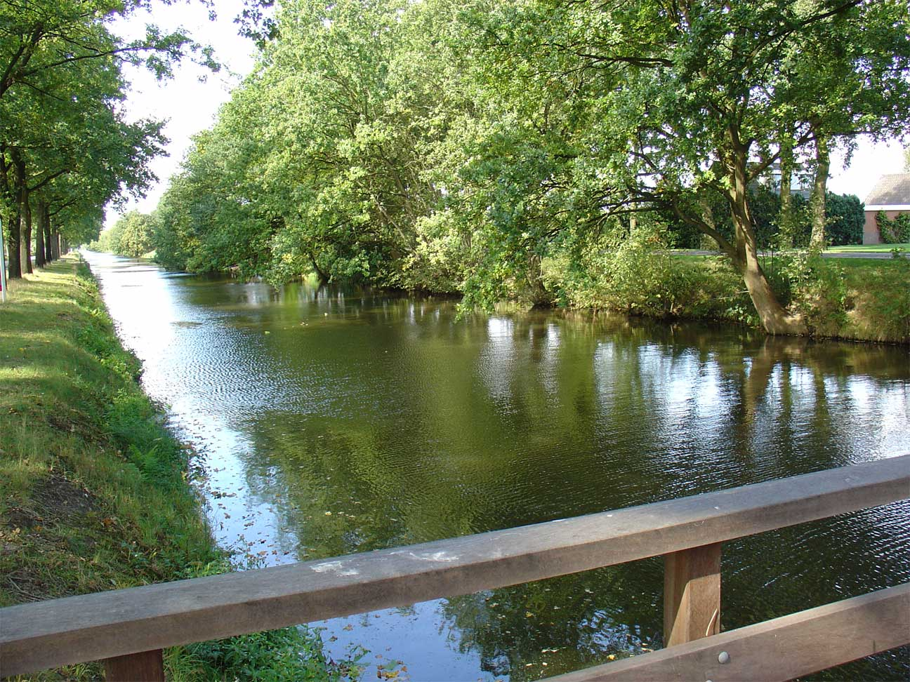 Verlengde Hoogeveensche Vaart in Zwartemeer